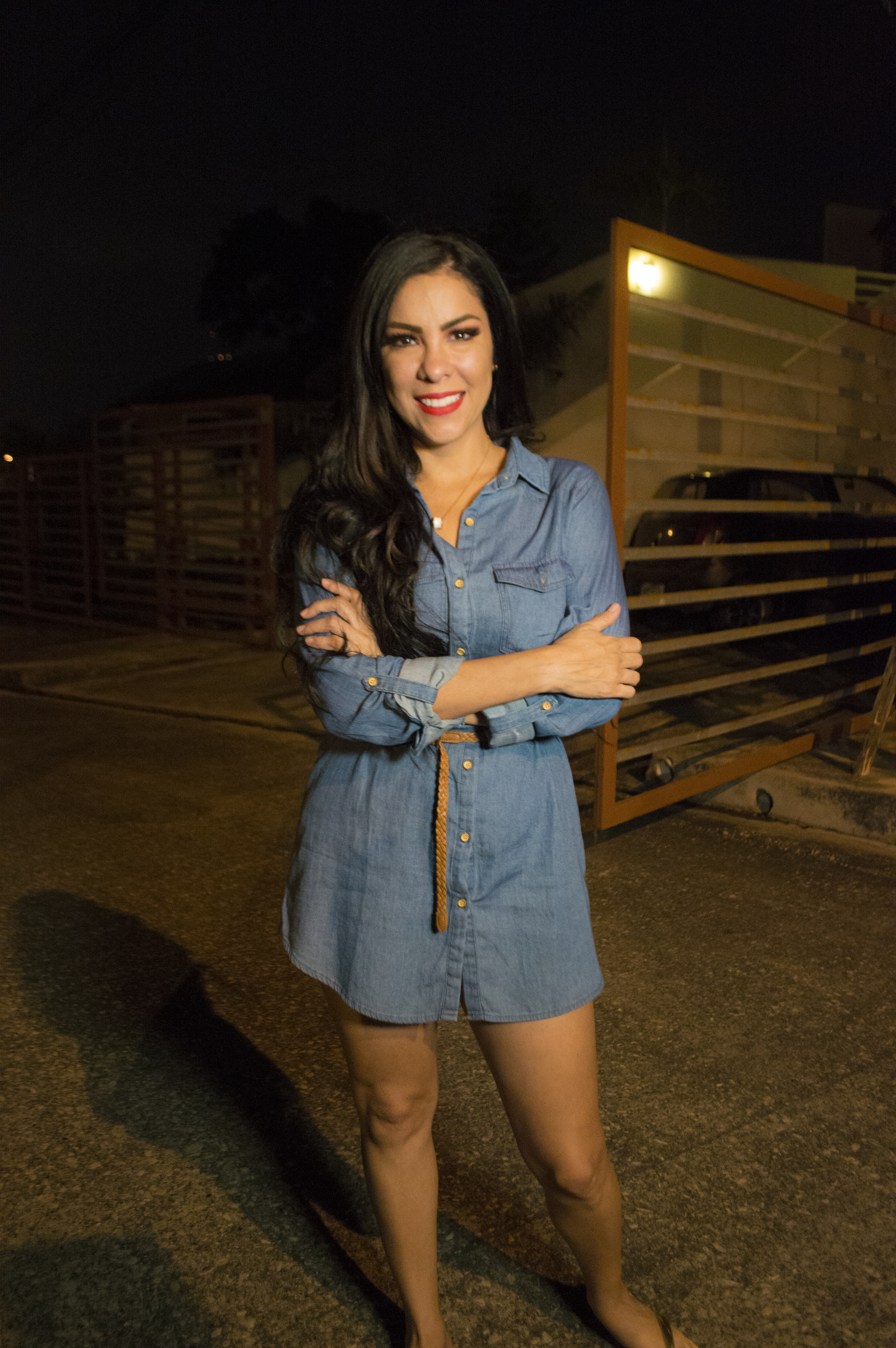 María Mercedes Pacheco en 2017